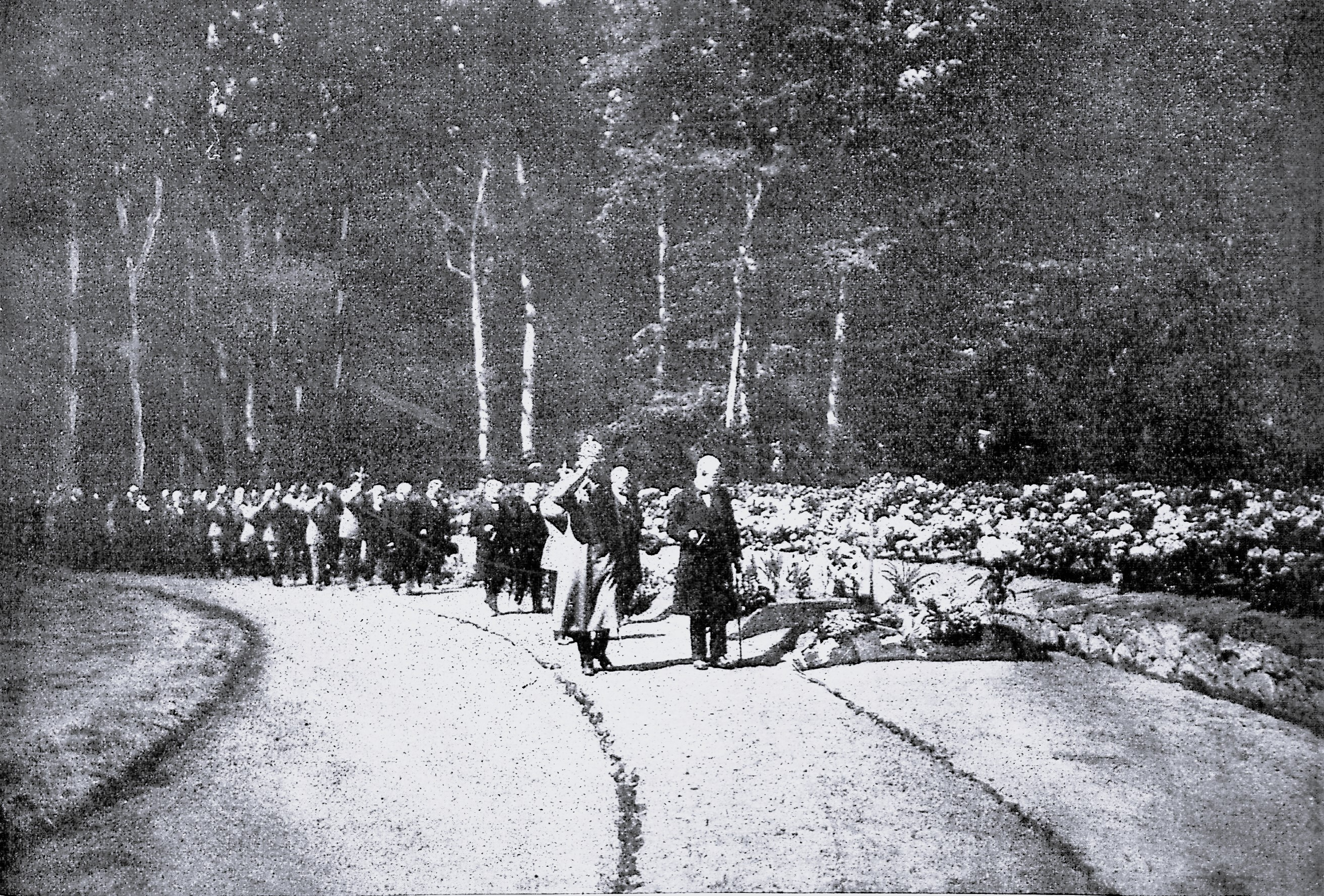 Gedächtnisfeier auf dem Ehrenfriedhof. Im Vordergrund Bürgermeister Eschenburg und Oberst v. Kuenheim.